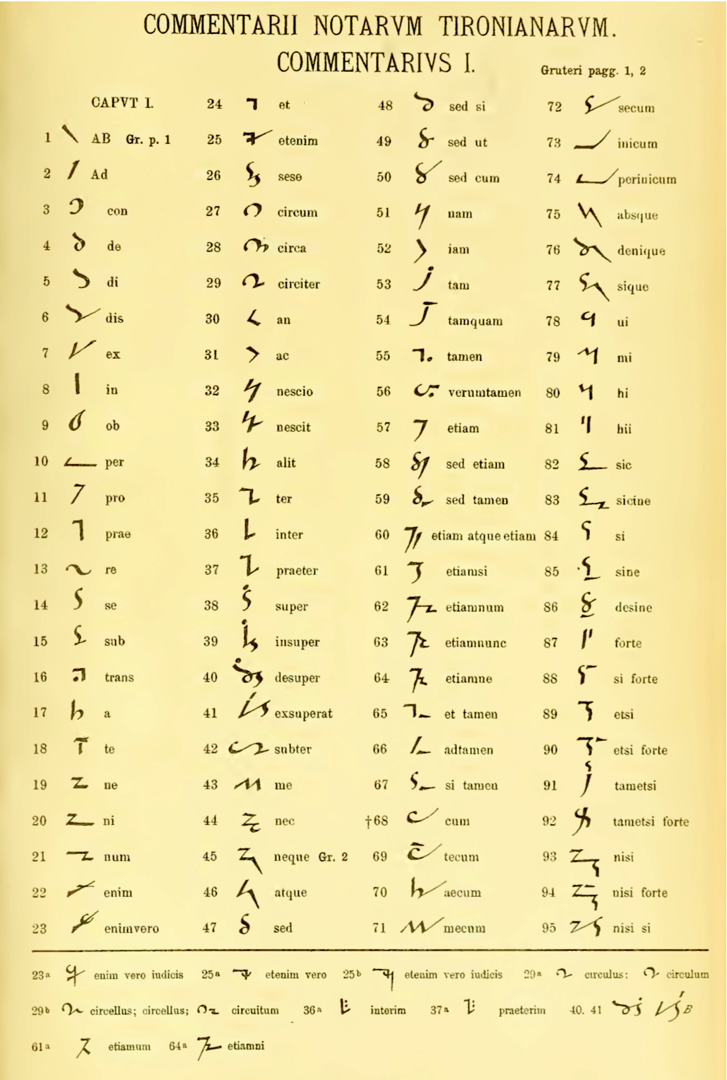 Planche d'abréviations issue de l'édition des Commentarii notarum tironianarum de Wilhelm Schultz.